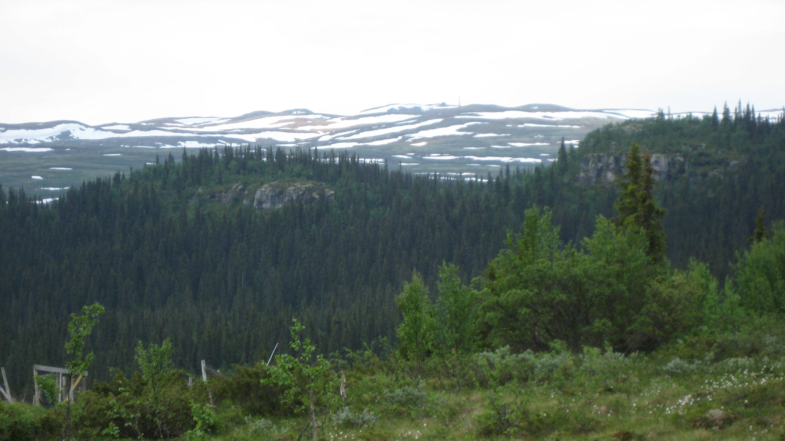 Skardberga sett fra Lundsætra